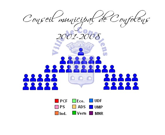 Répartition des sièges au Conseil municipal de Confolens.